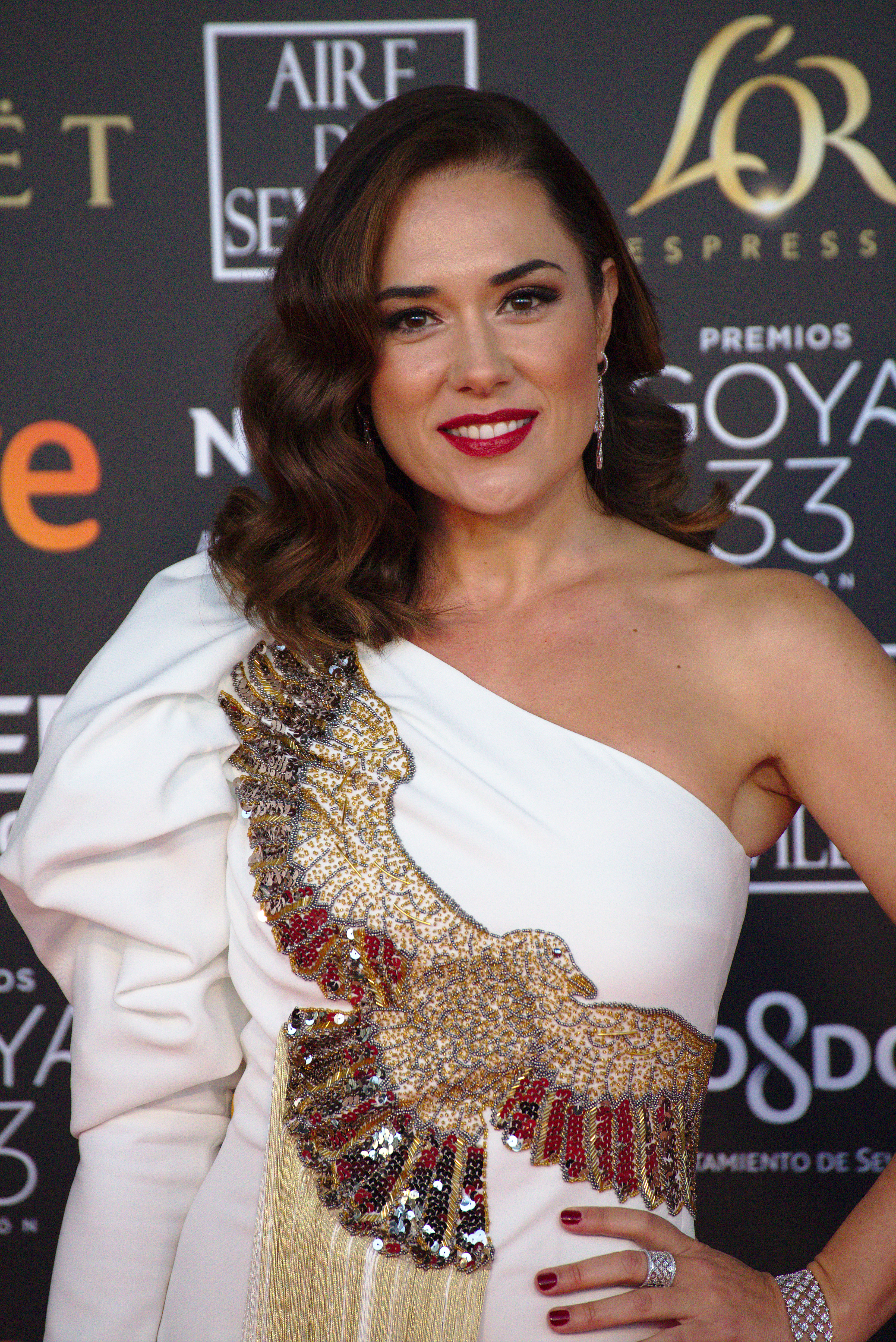 Eva Marciel en la alfombra roja de los Premios Goya celebrados en Sevilla en Febrero 2019